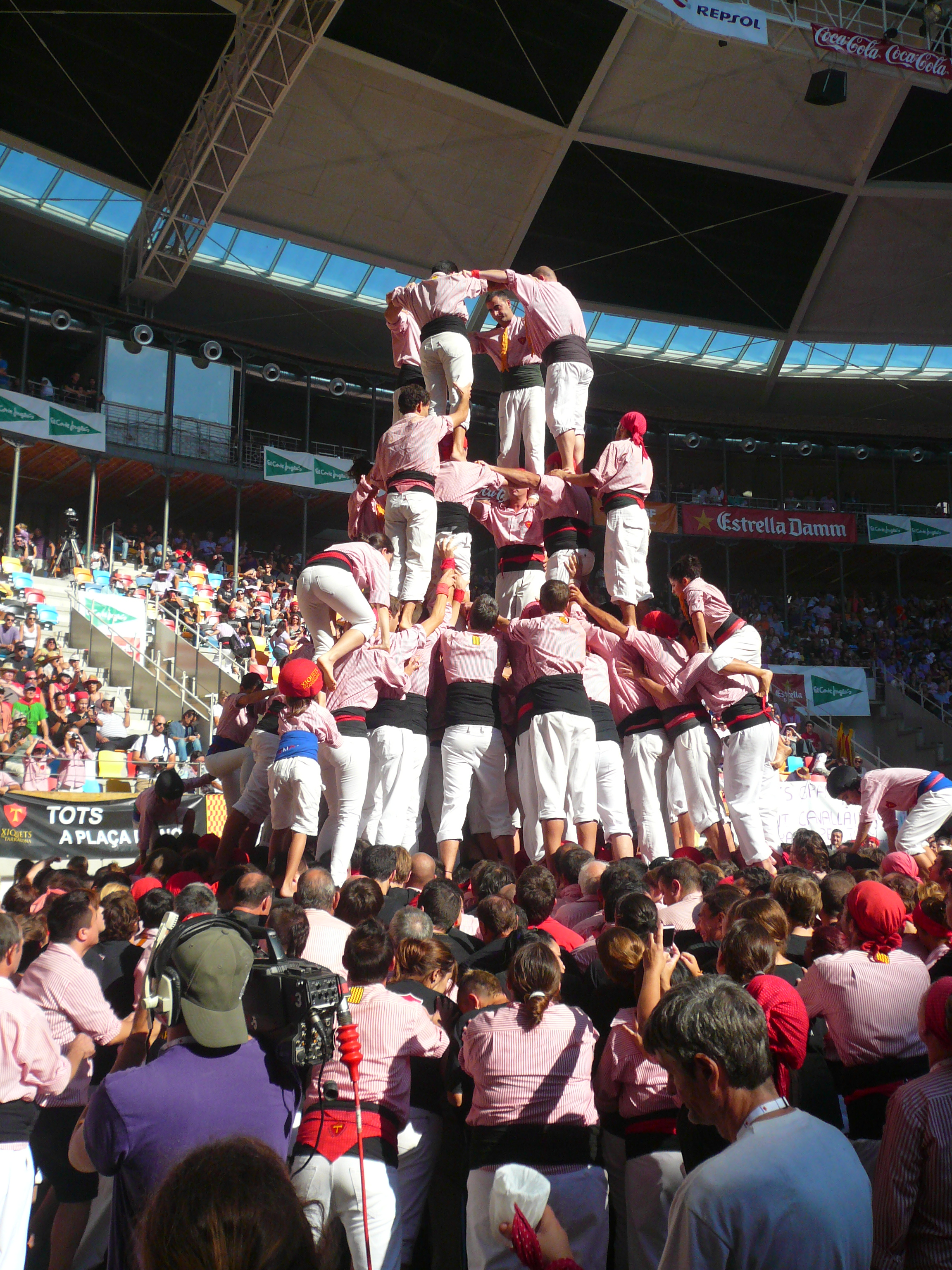 Concurs de Castells de Tarragona 2012, a la Plaça de Toros, o Plaça de Braus. c/ Eivissa - c/ Jaume I - c/ Mallorca (Tarragona). Object location41° 06′ 51.64″ N, 1° 14′ 43.03″ E